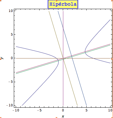 Esta gráfica representa una hipérbola girada un determinado ángulo.